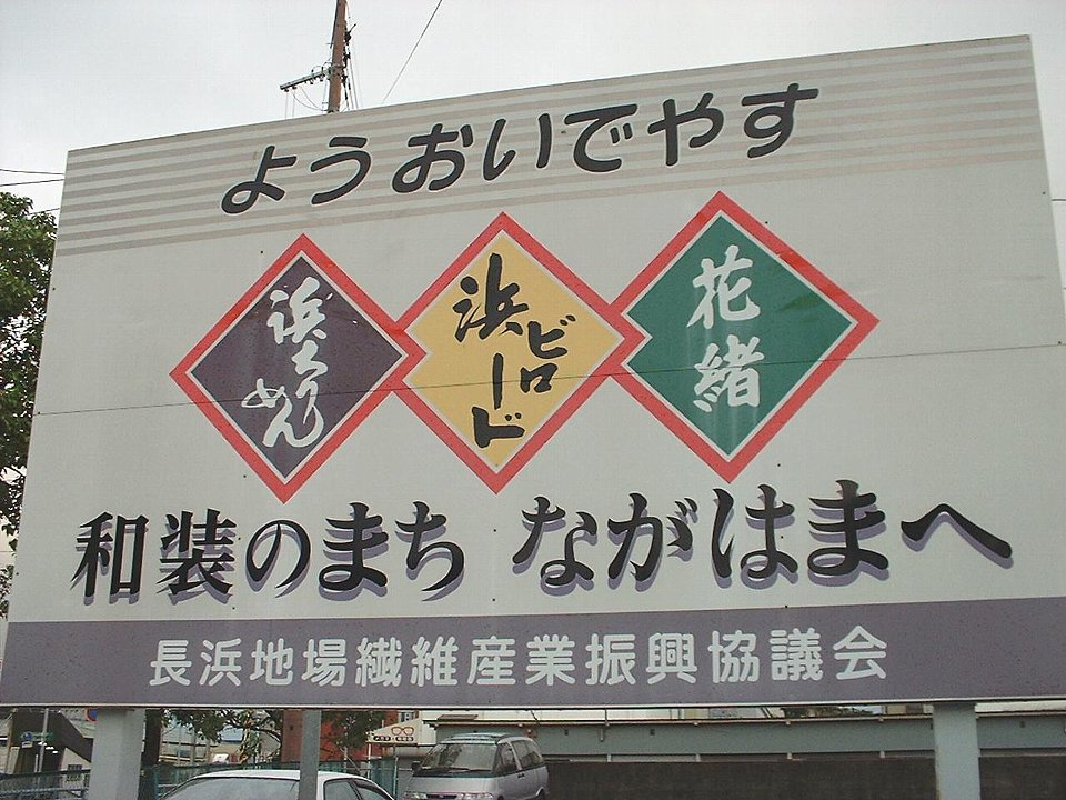 近江弁の一例 長浜市にて